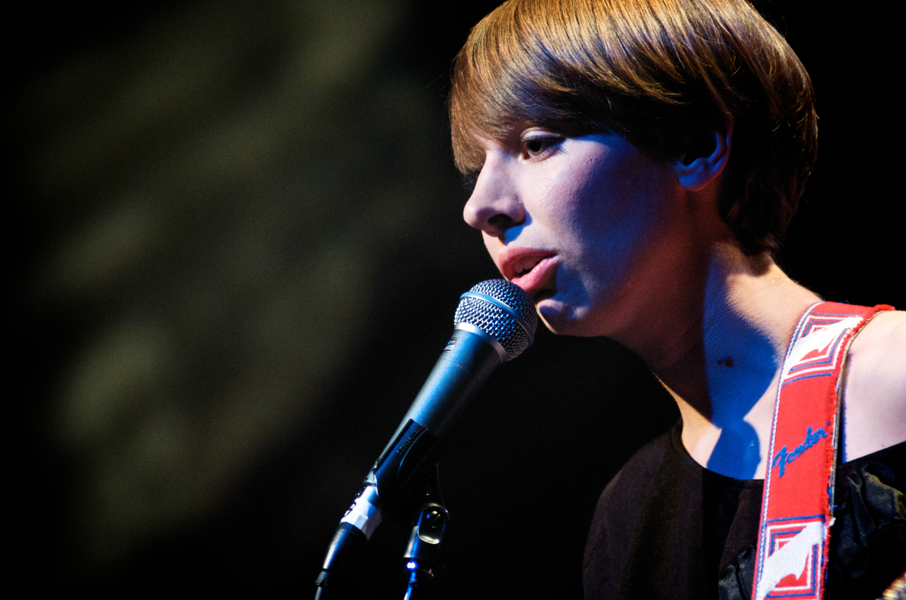 Invasão Sueca - Show realizado no SESC Pompéia, dia 24 de Setembro de 2009.